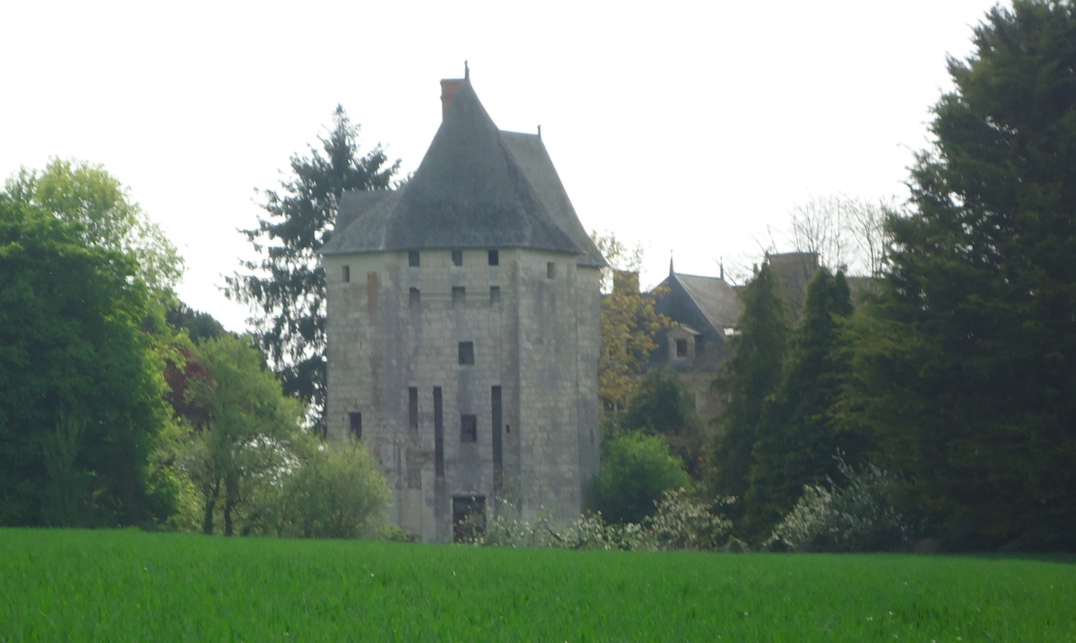 Château du Fort-des-Salles, XIVe, XVe & XVIIIe (Part MH & ISMH)